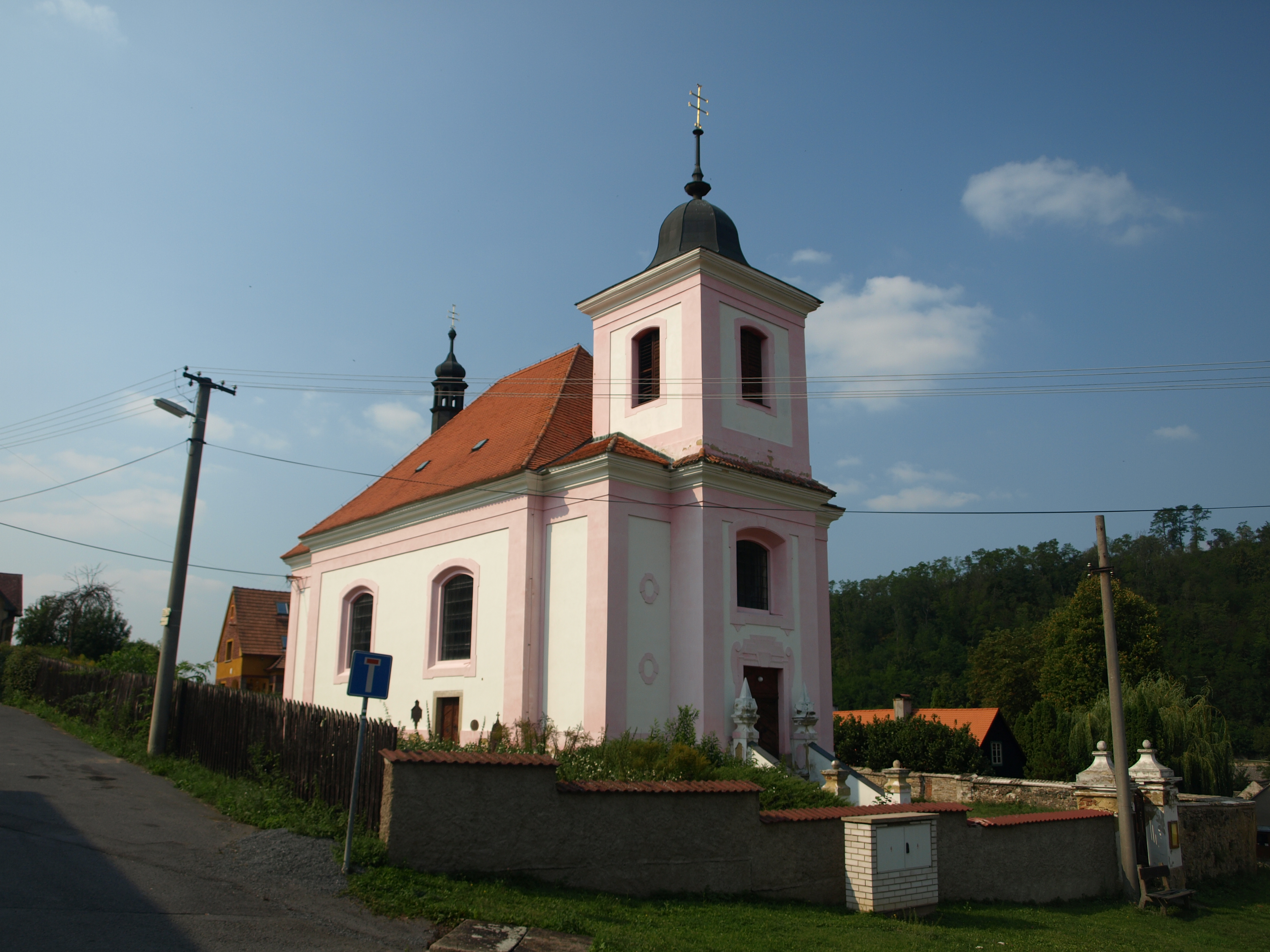 Kostel sv. Jakuba Většího (Městečko), Městečko